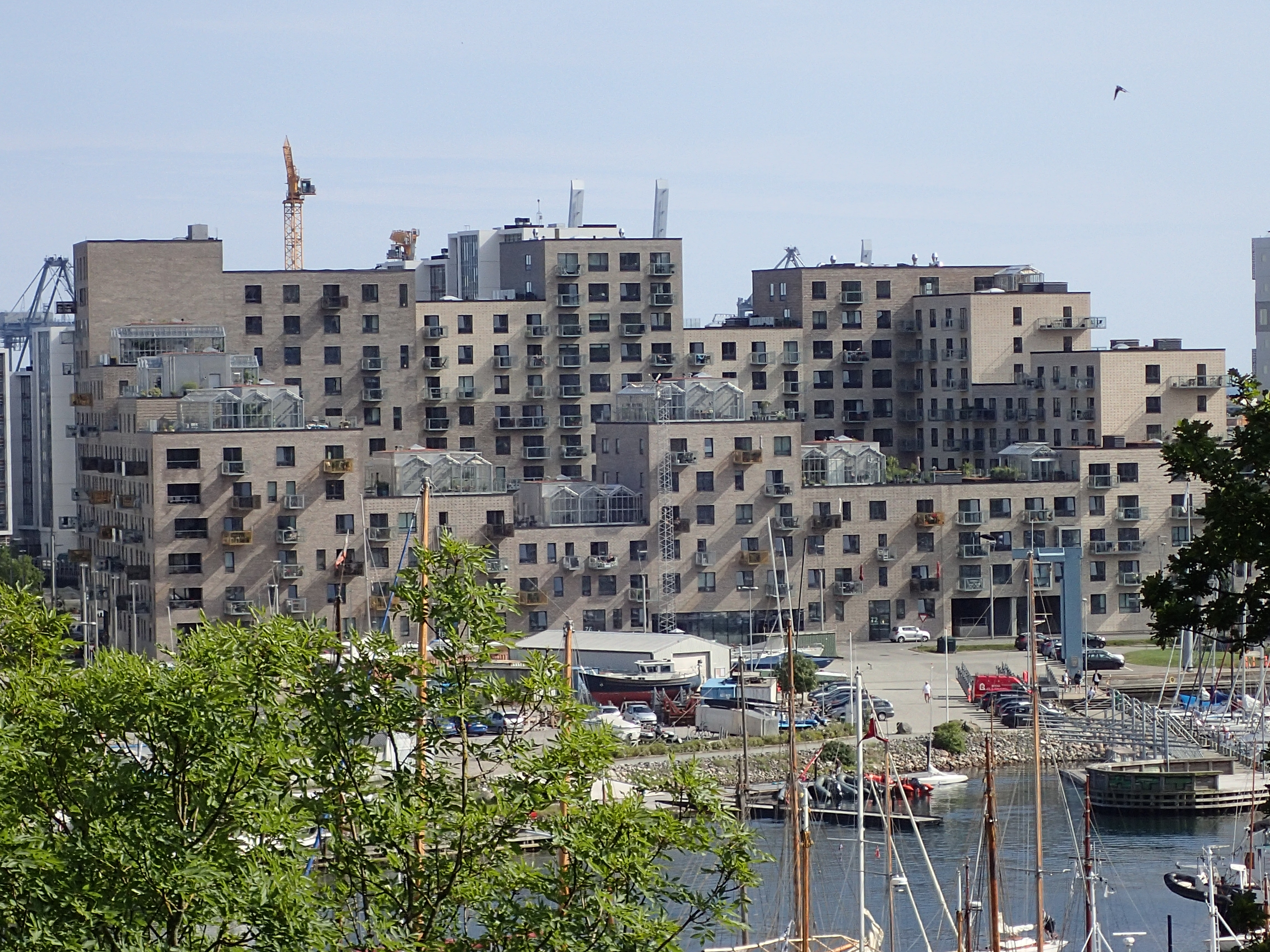 Havnehusene og Kanalhusene på Aarhus Ø. De to bygerier ligner hinanden og er begge tegnet af Luplau & Poulsen Arkitekter. Havnehusene ligger i front mod Træskibshavnen og Kanalhusene ligger i baggrunden langs Bernhardt Jensens Boulevard.